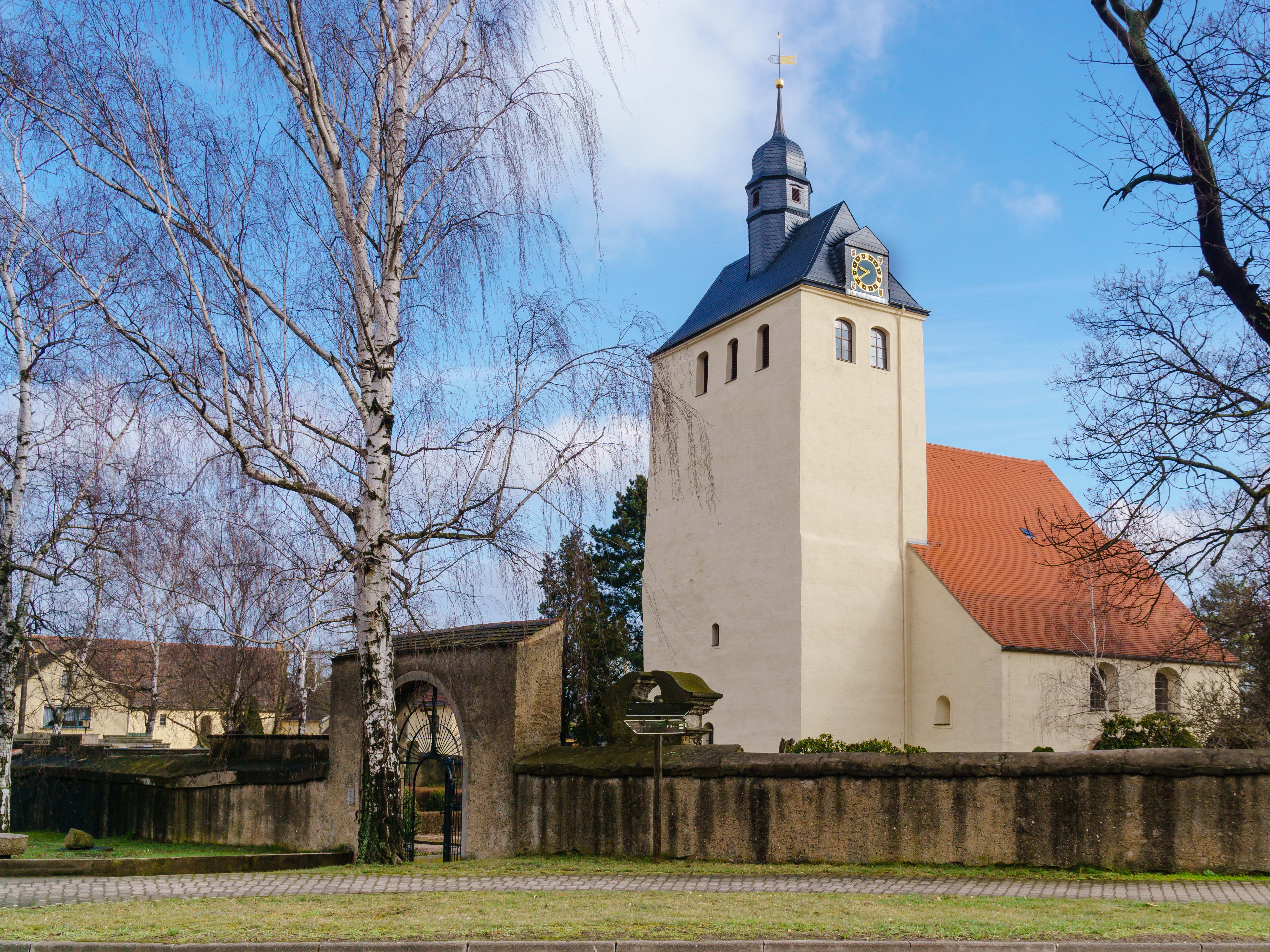 Wehrkirche, Hauptstraße 29 in Parthenstein OT Pomßen